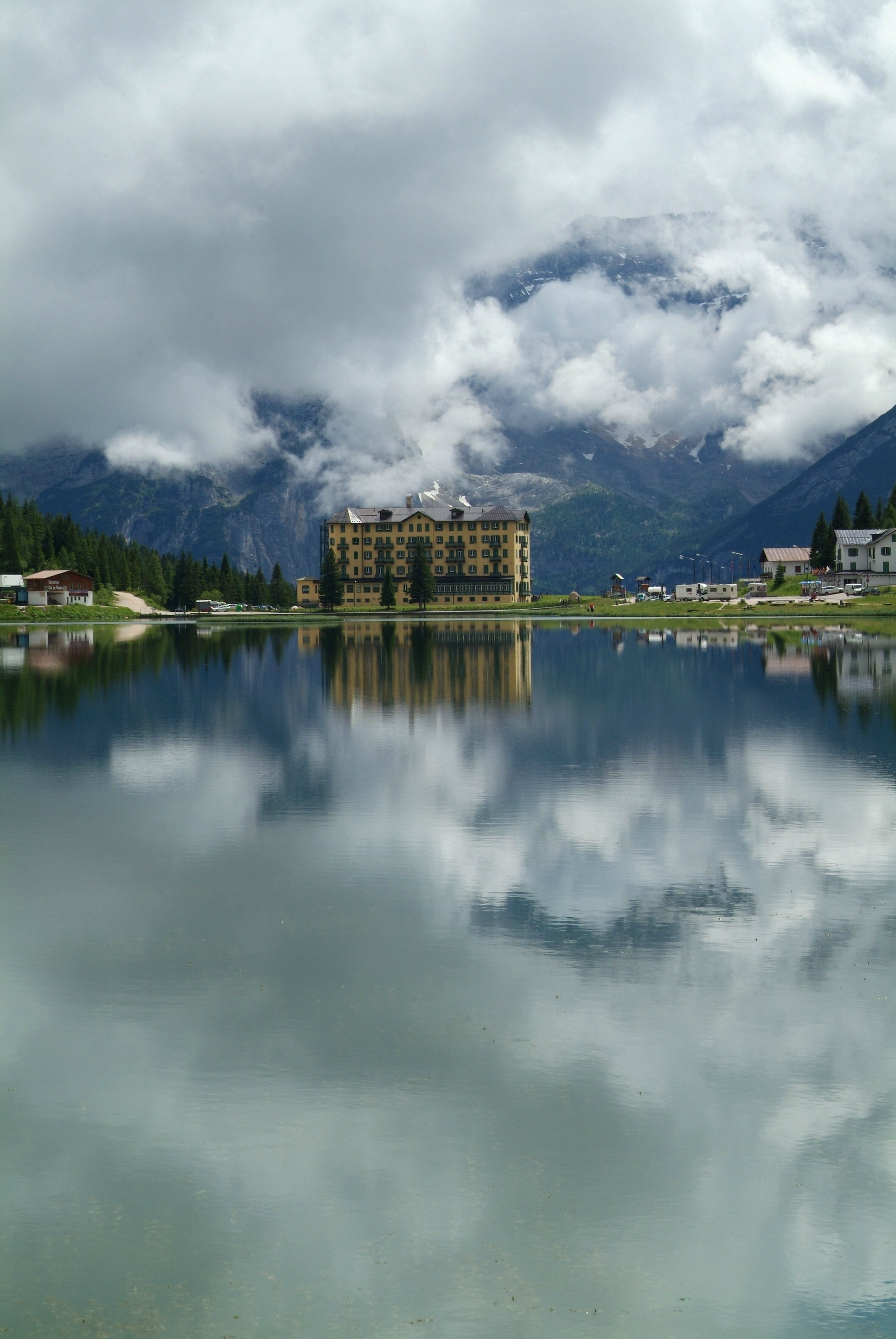 Lake Misurina